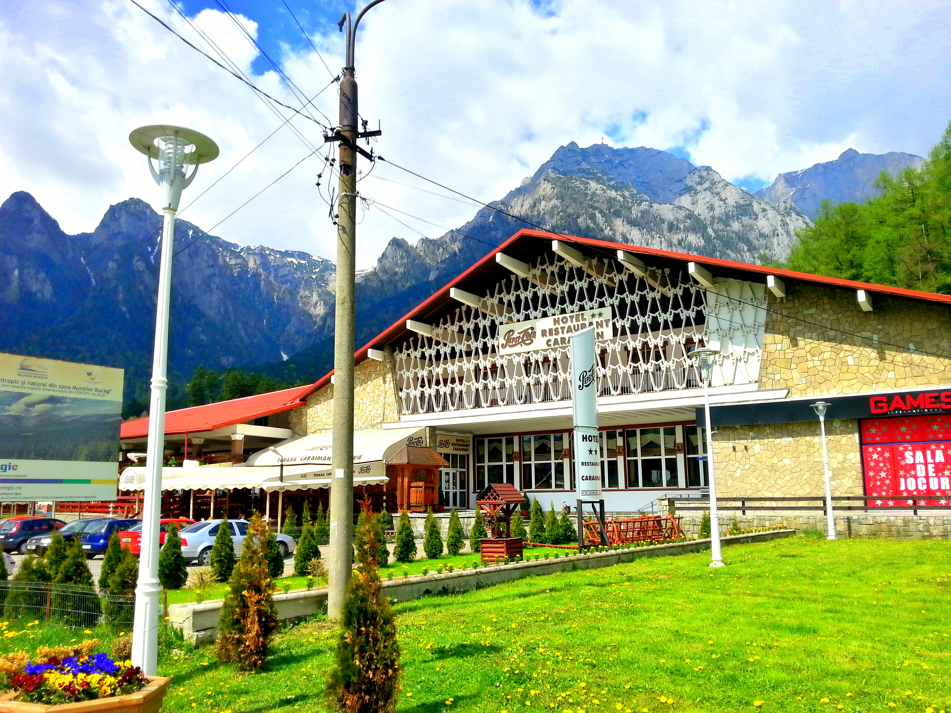 Hotel Caraiman- Busteni